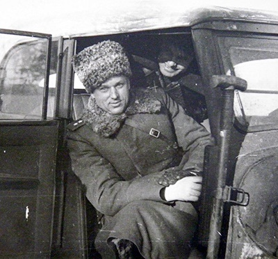 Константин Константинович Рокоссовский